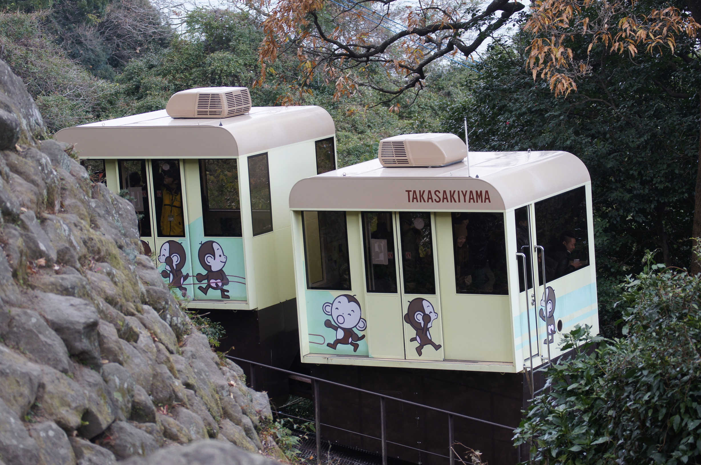 高崎山自然動物園の小型ja:モノレール(さるっこレール）